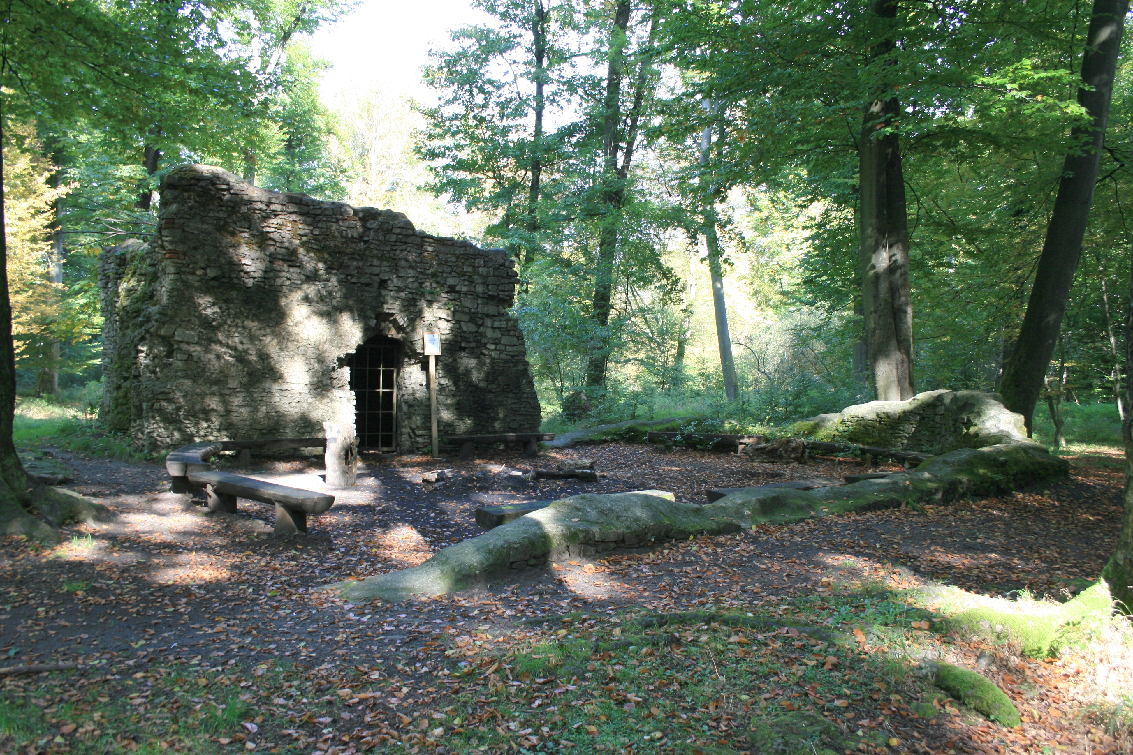 Klosterruine St. Wolfgang bei Hanau, Hessen. Blick in die oestliche Apsis der Kirche und auf das erhaltene Sakristeigebaeude.